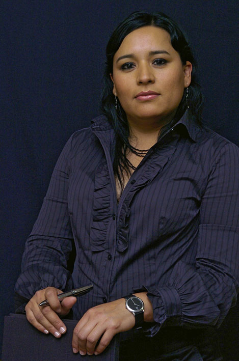 Periodista Ana Lilia Perez, Premio Nacional de Periodismo 2010